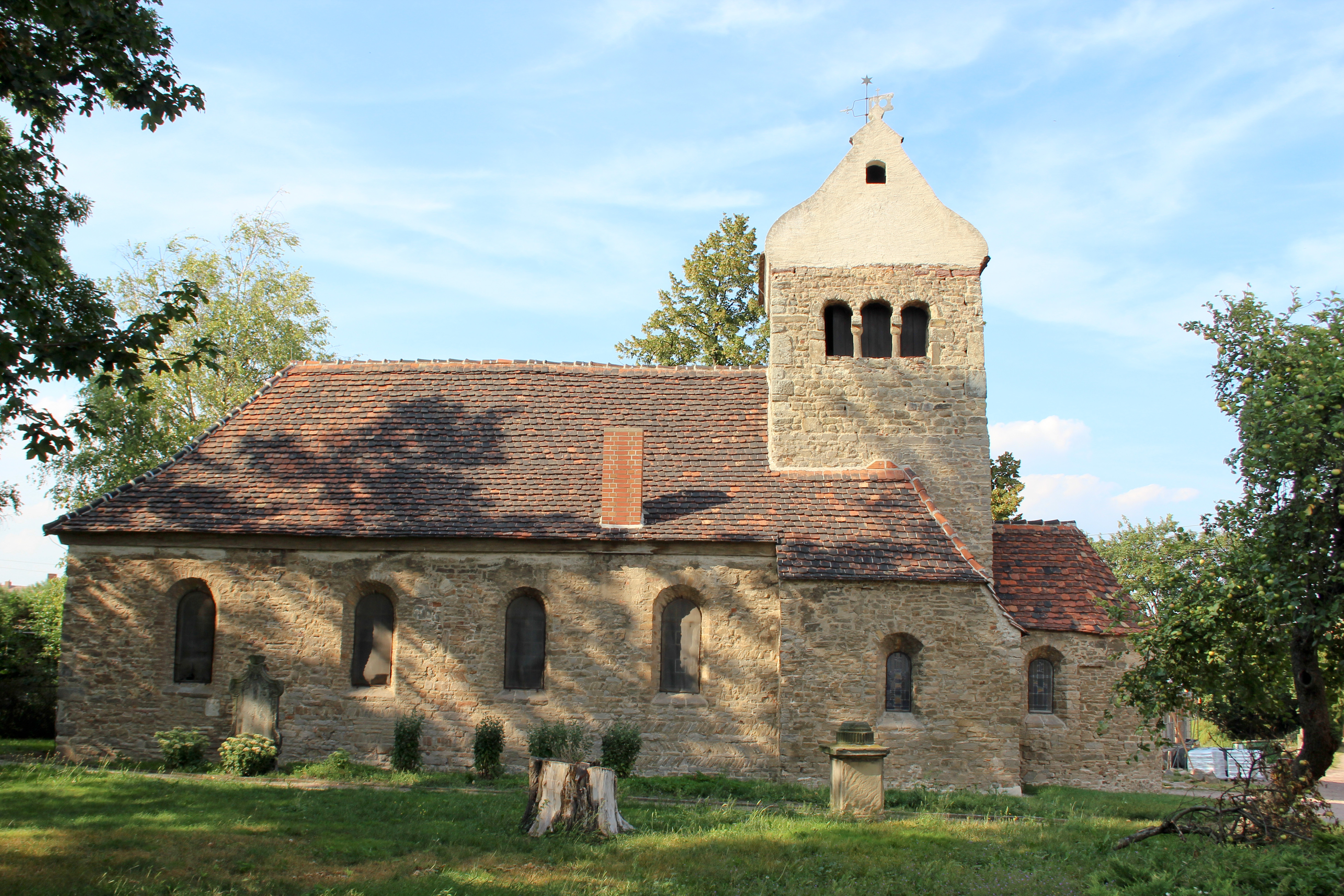 Kirche in Großwülknitz, Sachsen-Anhalt.